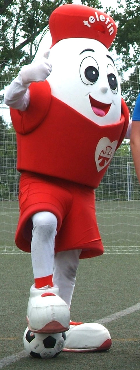 Fútbol Femenino Teletón 2010